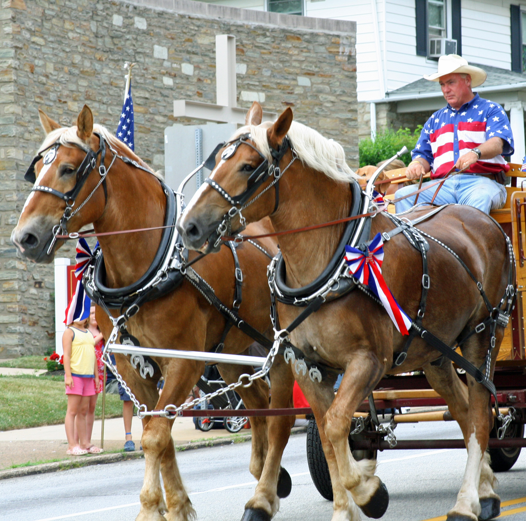 Belgian Draft Horses